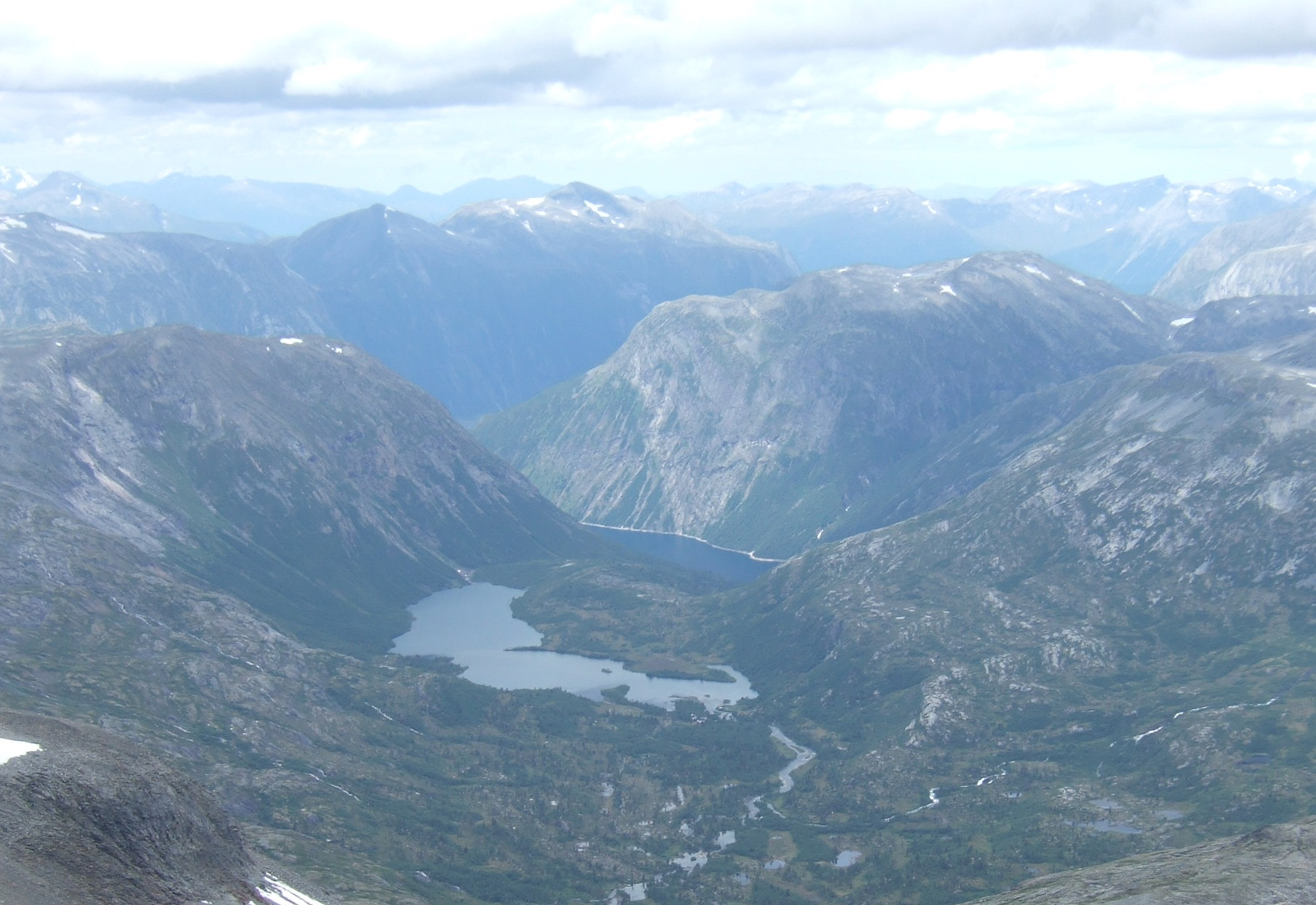 Reindalen in Møre og Romsdal seen from Naushornet. Zakariasvatnet lake can also be seen.